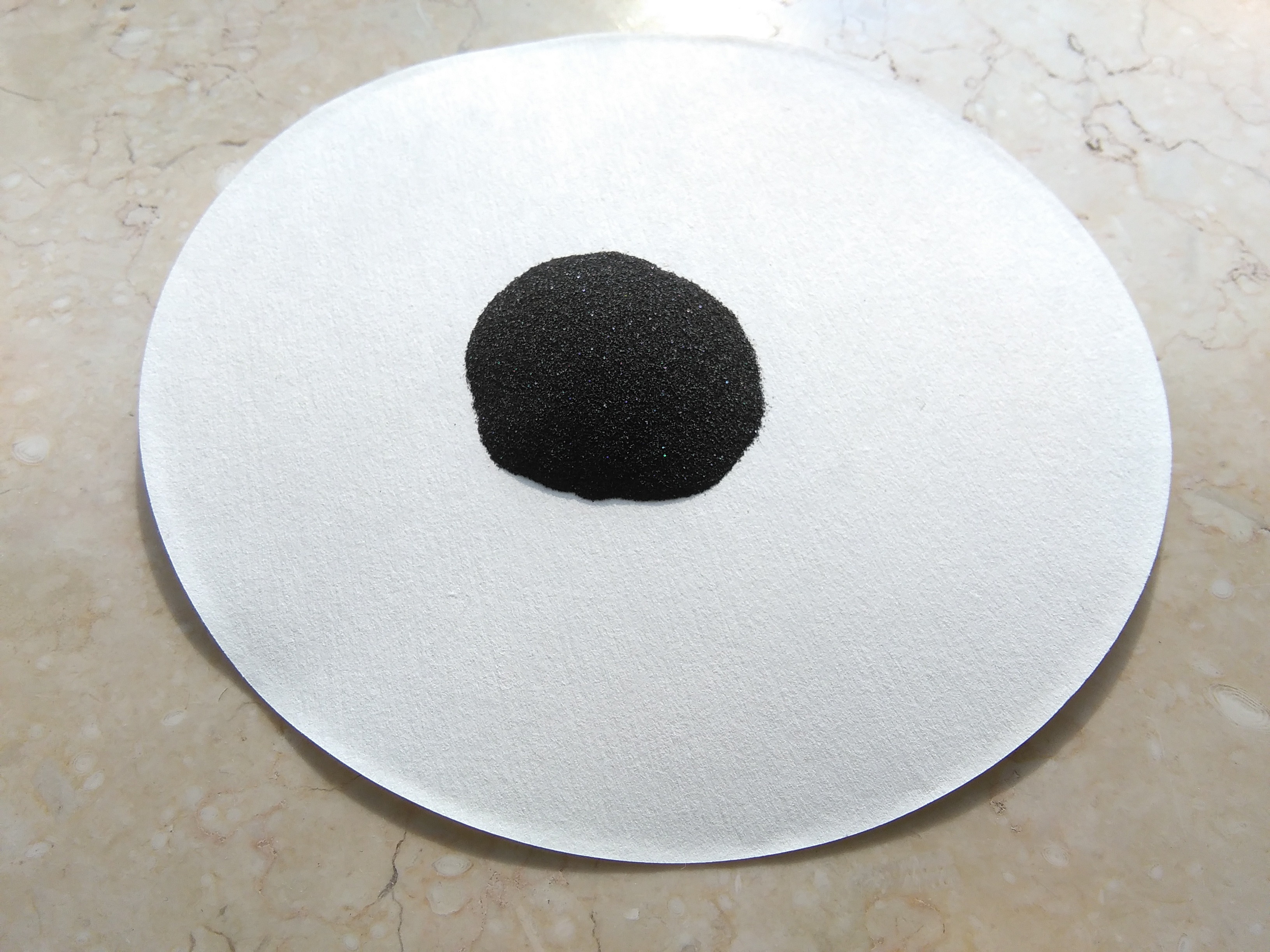 一氧化硅，99.8%纯度，光谱级。